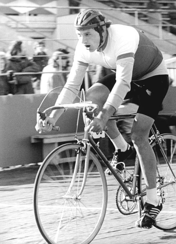 Bernd Drogan ADN-ZB Reiche 19.4.80 Halle: Vier-Etappen-Rennen auf Friedensfahrkurs. Sieger des Zeitfahrens in Halle wurde auf dem 40-km-Kurs Bernd Drogan (SC Cottbus) in 57:45 min. Abgebildete Personen: Drogan, Bernd: Radrennfahrer, Friedensfahrtteilnehmer, DDR